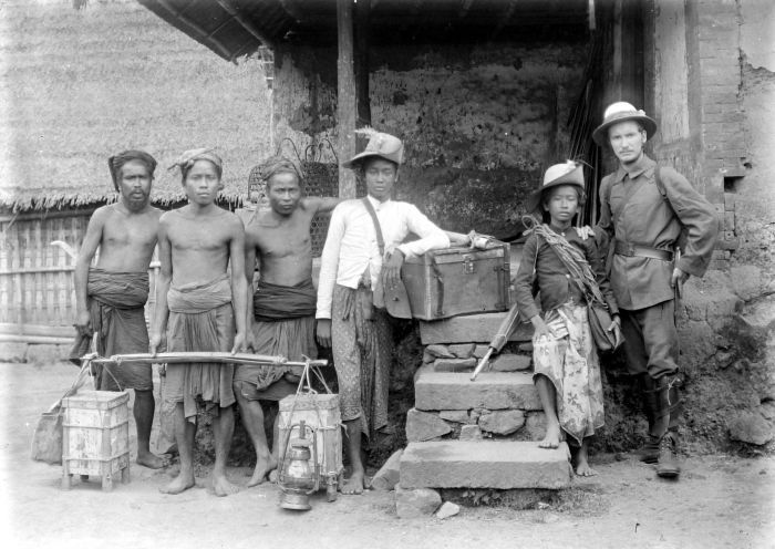 Negatief. Portret van een Europeaan met bagage en dragers